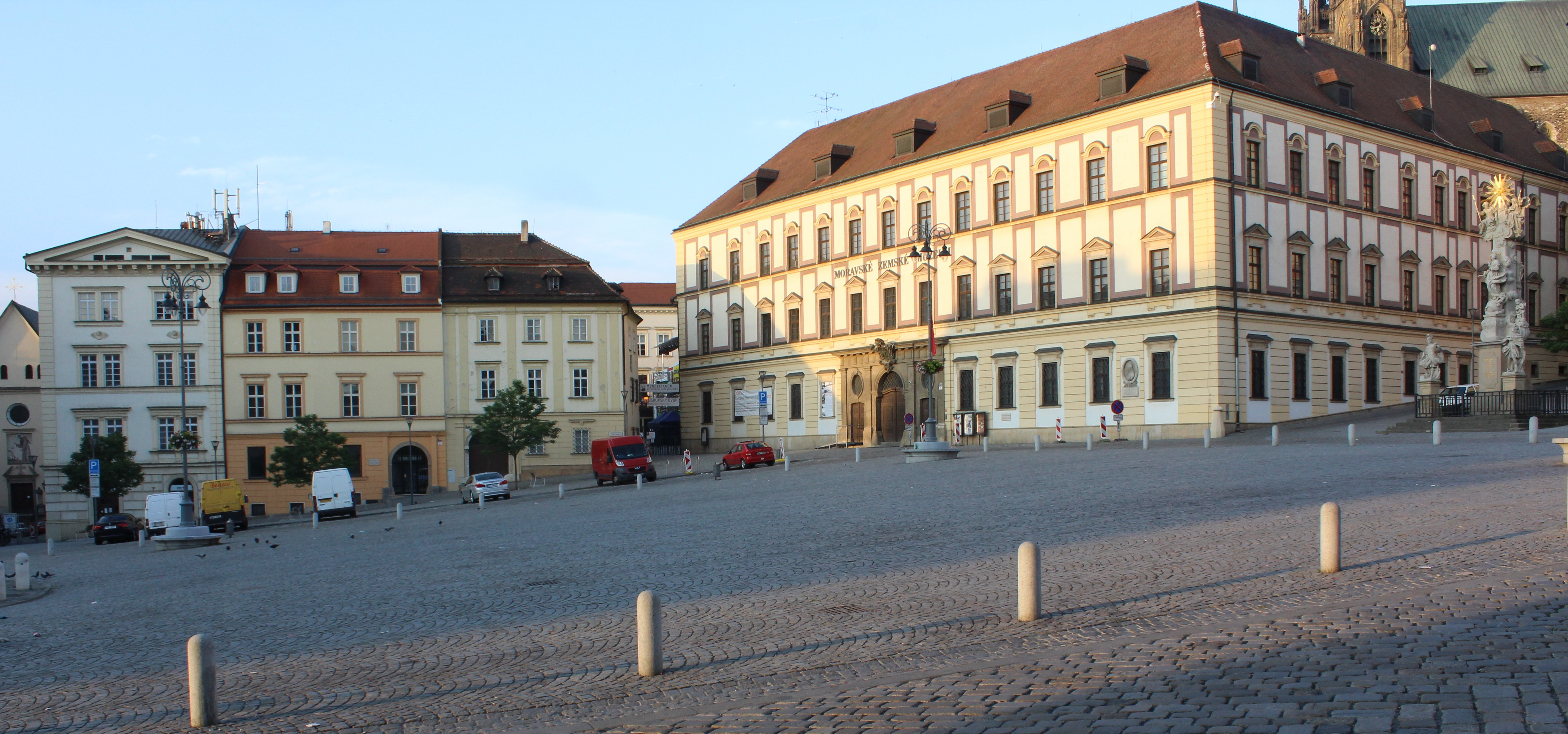 Moravian museum, hole cluster of MM buildings